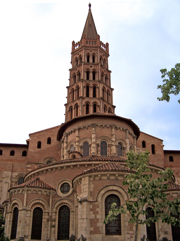 Abside et clocher de type toulousain de la basilique St Sernin à Toulouse (France)